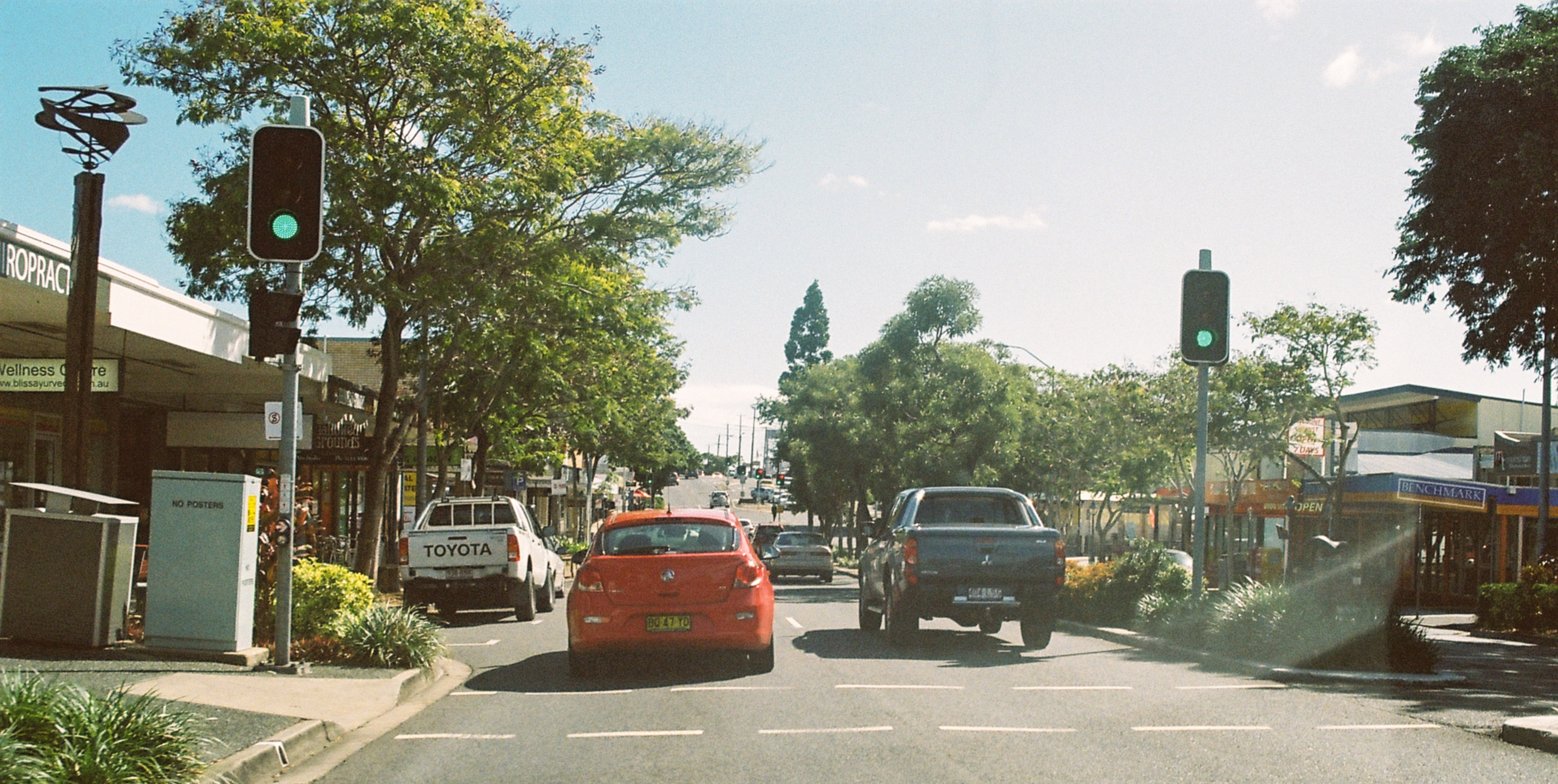 Pentax K-1000-2